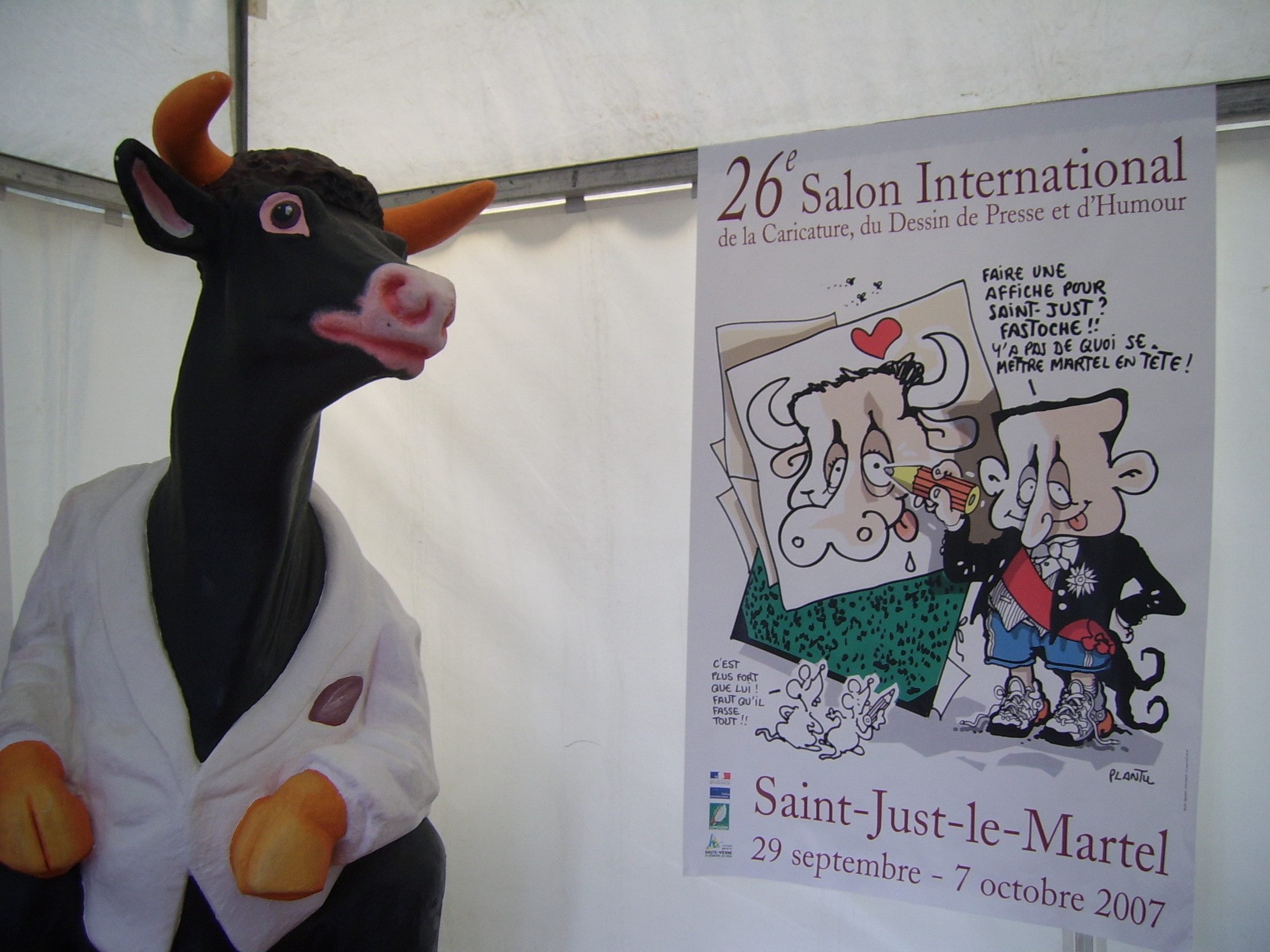 Une des "vaches" de St-Just et affiche officielle du 26ème salon en 2007